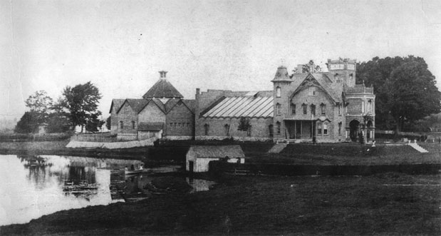 La grange Alexander-Solomon-Walbridge située à Mystic (Saint-Ignace-de-Stanbridge, Québec). Photo prise vers 1887, on y voit la grange et le Lakelet Hall. La serre n'a pas encore son mur fenêtré ni son toit vitré.